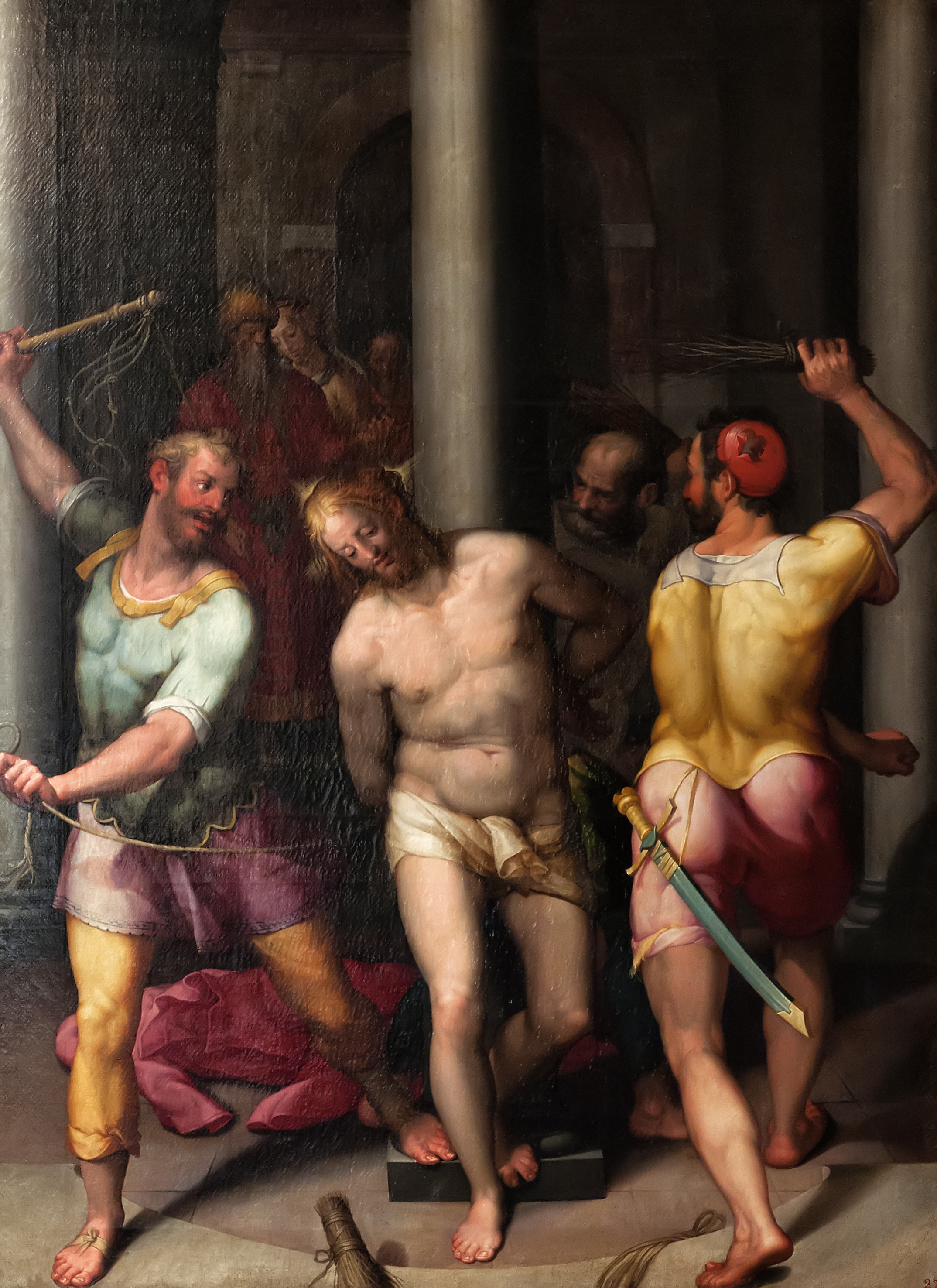 De geseling van Christuslabel QS:Lnl,"De geseling van Christus"label QS:Lit,"Flagellazione di Cristo"